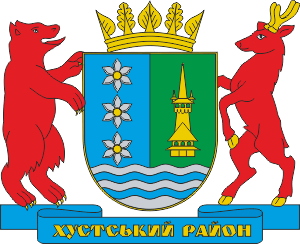 Герб Хустського району